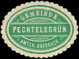 Sealing stamp Title: Gemeinde Pechtelsgrün - Amtshauptmannschaft Auerbach Description: grün, weiß, geprägt Place: Pechtelsgrün size: 3x4 cm